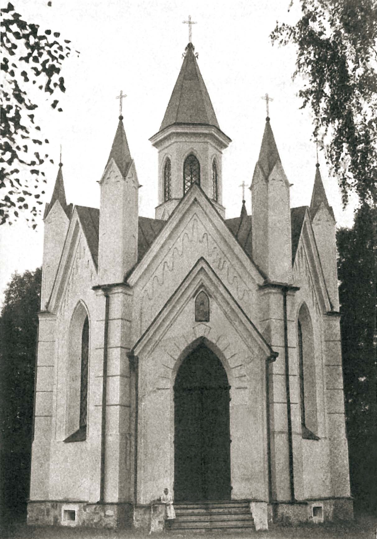 Беларуская (тарашкевіца): Багушэвічы (Bahuševičy). Касьцёл